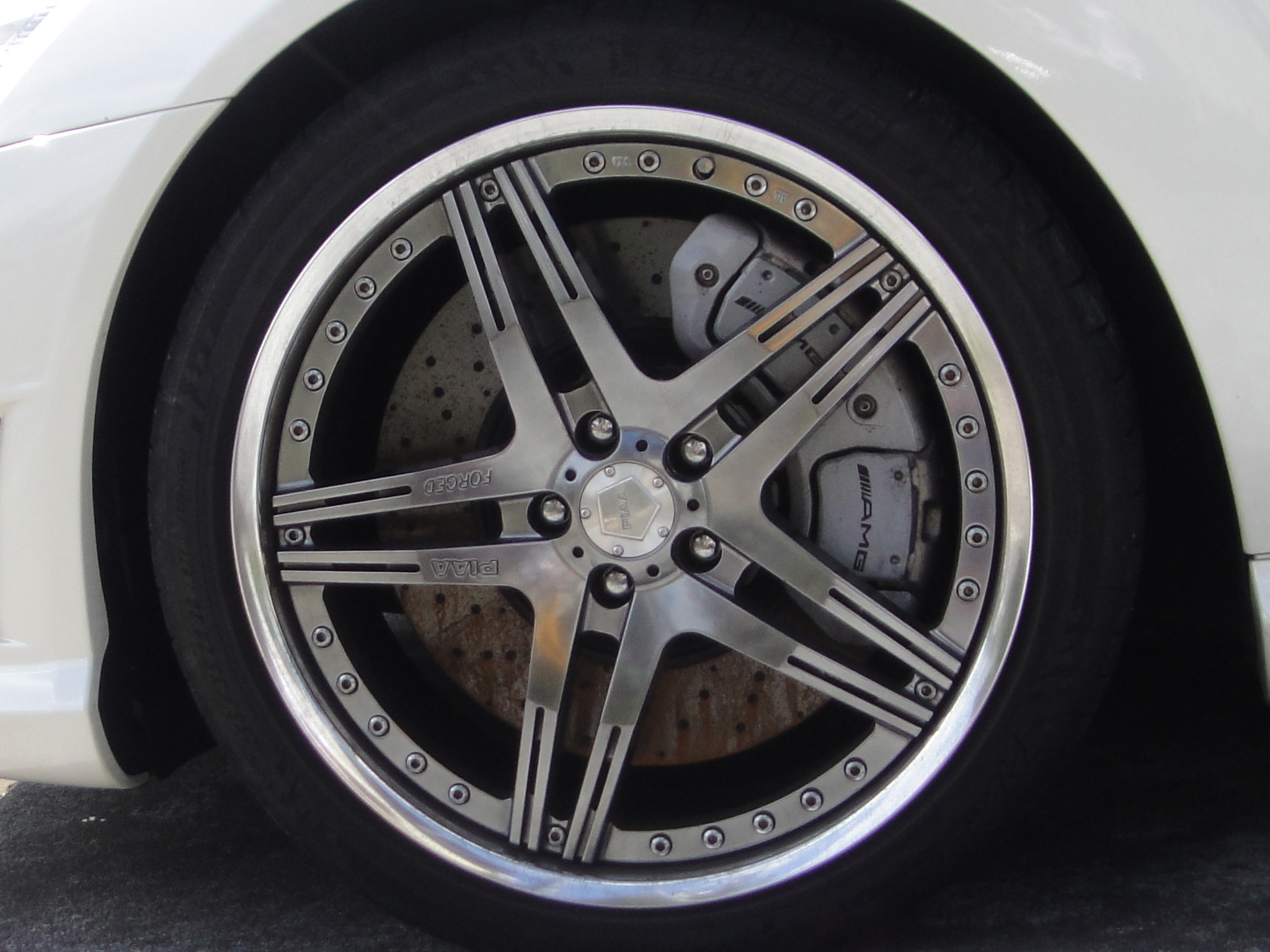 PIAA PREMIUM FORGED F301 PIAA ホイール S65 AMGへの装着例。